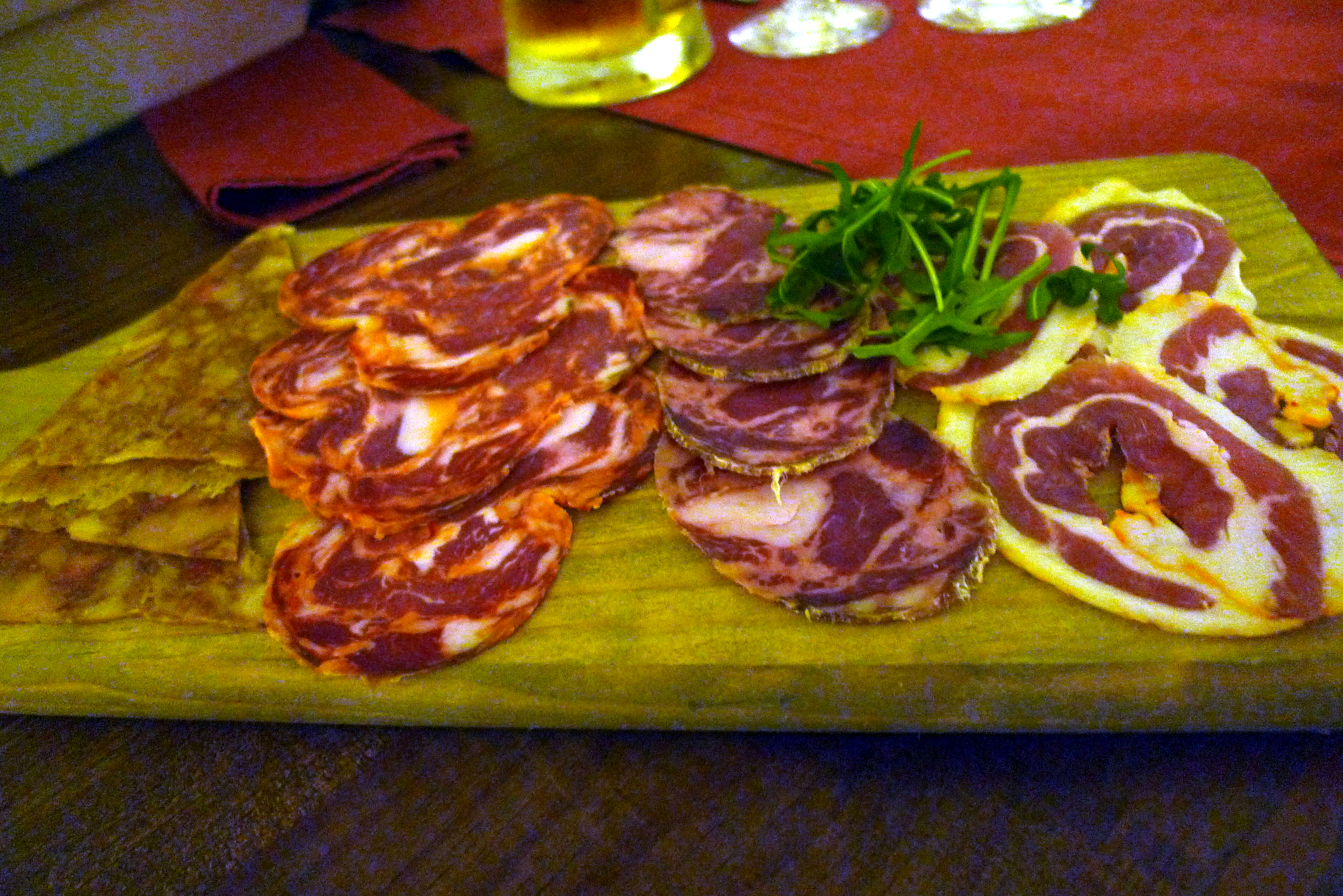 L1190733